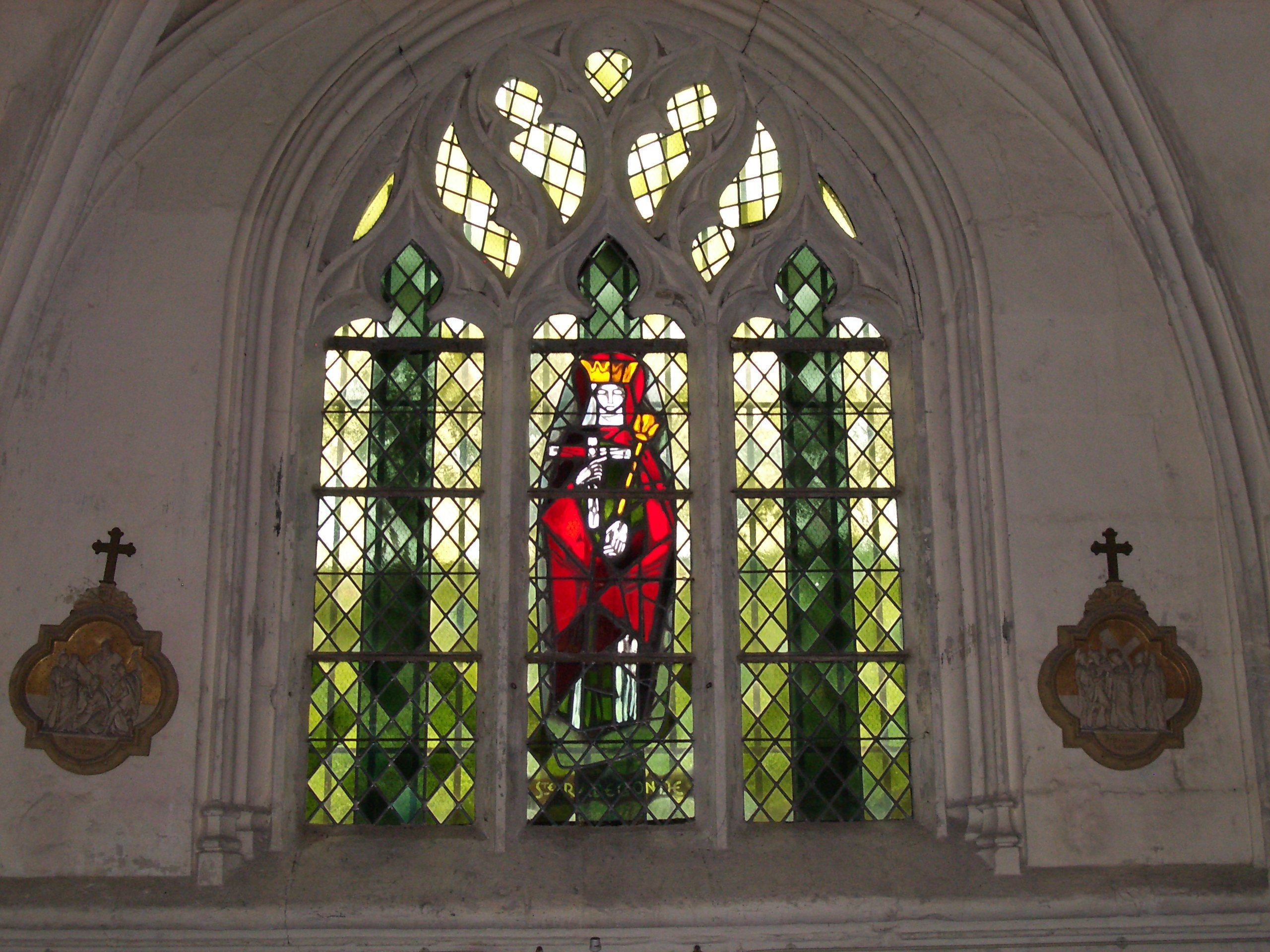 Vitrail de Sainte Radegonde dans l'église de Giverny (Eure)